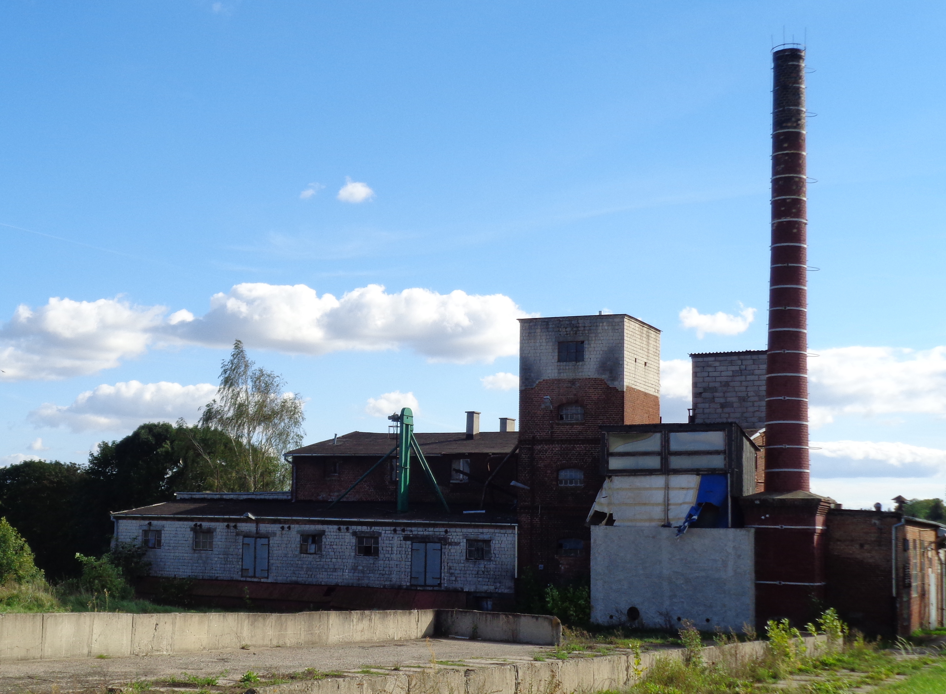 Brennerei in Gockowice (Götzendorf) von Norden gesehen